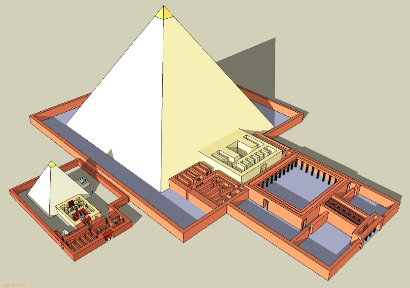 Essai d'élévation des pyramides royales de Néferirkarê Kakaï et de Khentkaous II à Abousir - Ve dynastie égyptienne